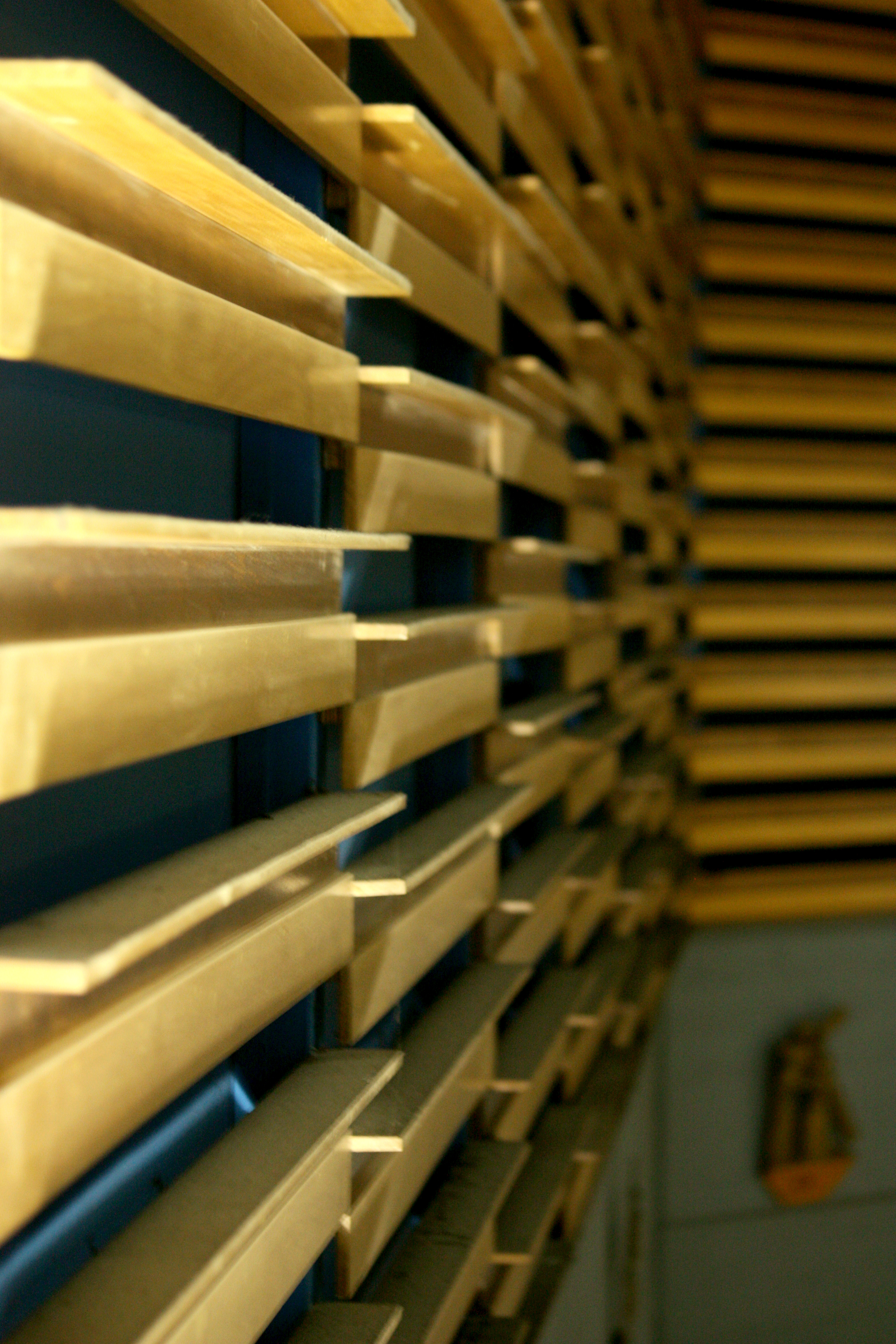 Chiesa della Sacra Famiglia (Barletta) - Particolare del dogato ligneo che riveste la parte superiore dell'aula liturgica